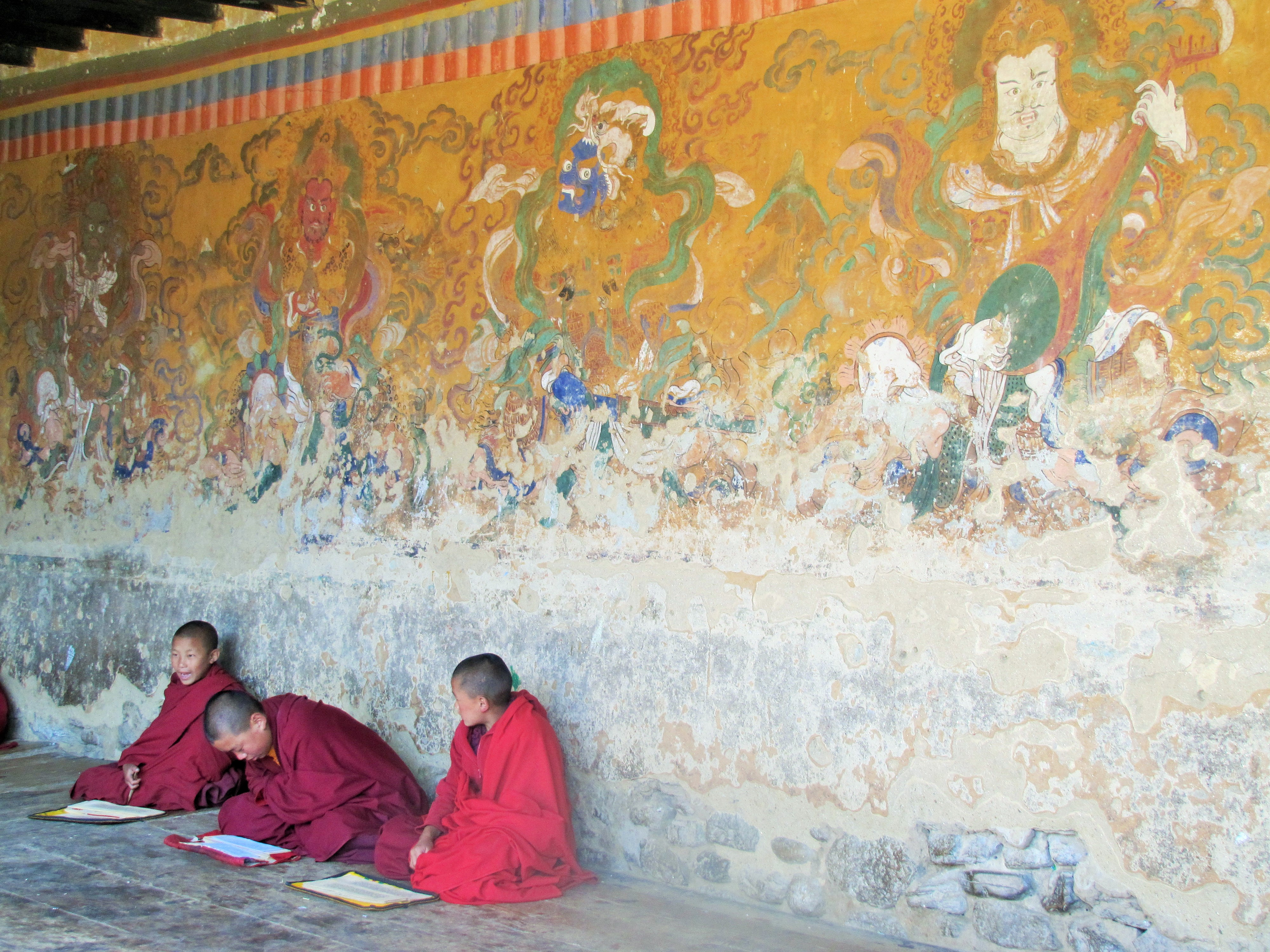 Bumthang Tamshing Goemba Monks Studying 1